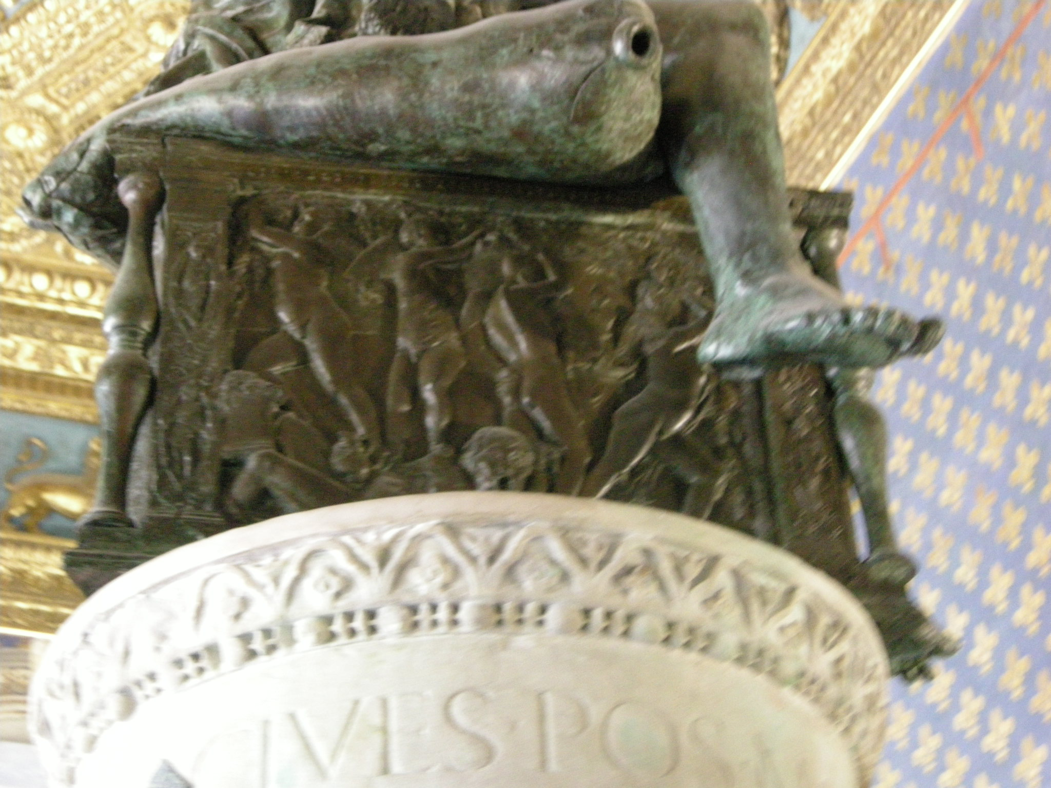 Sala dei gigli, giuditta e oloferne